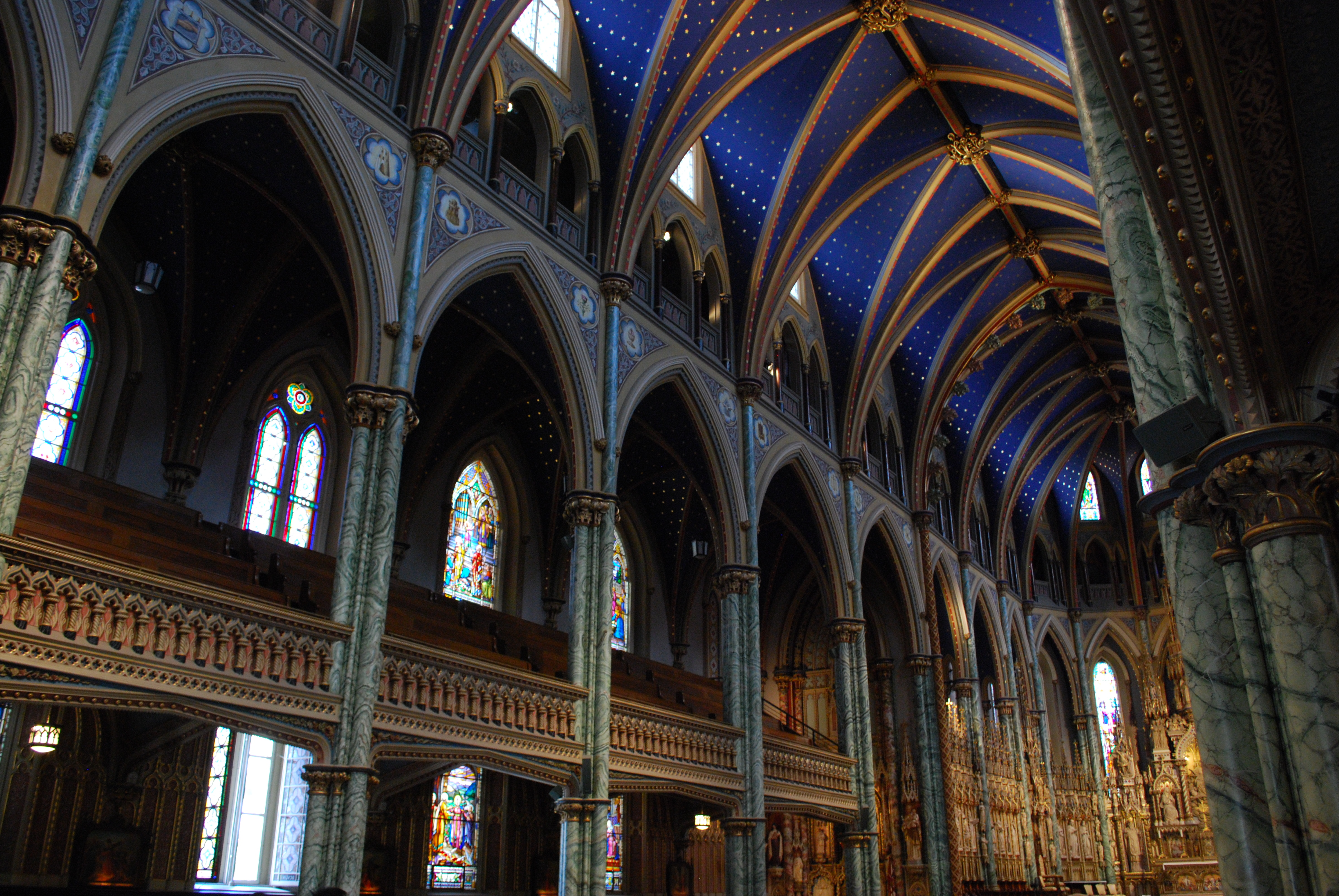 Piliers de la nef de la Basilique-Cathédrale Notre-Dame d'Ottawa